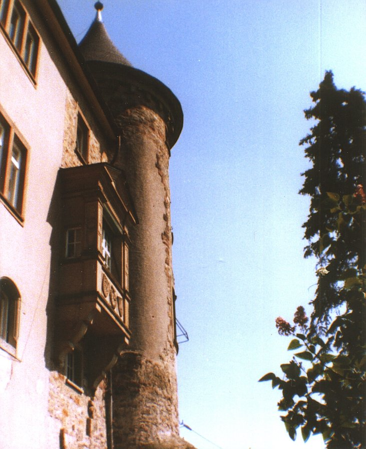 Burg Rotenberg bei Rauenberg, 1921/1922 neu erbaut anstelle der alten Burg